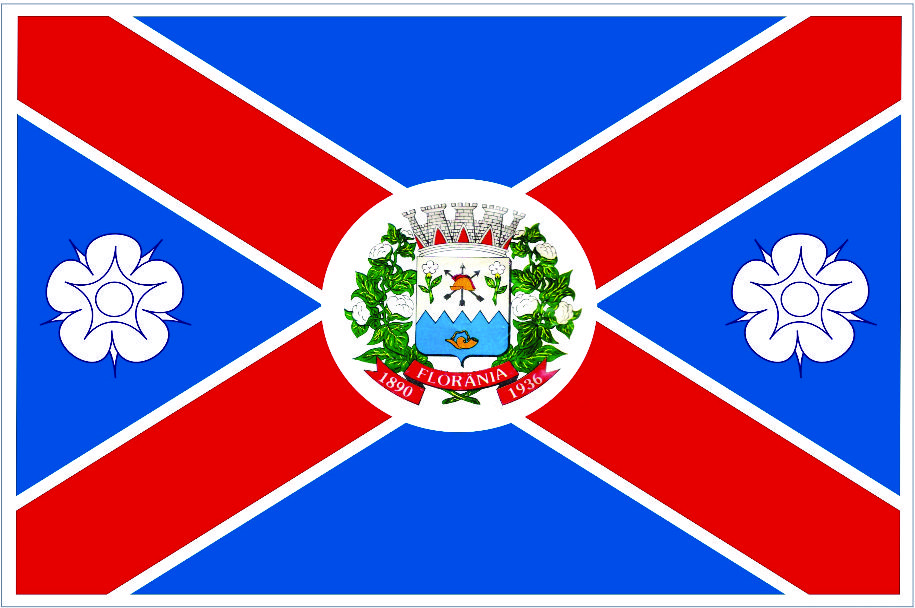 Bandeira de Florânia, Rio Grande do Norte, Brasil